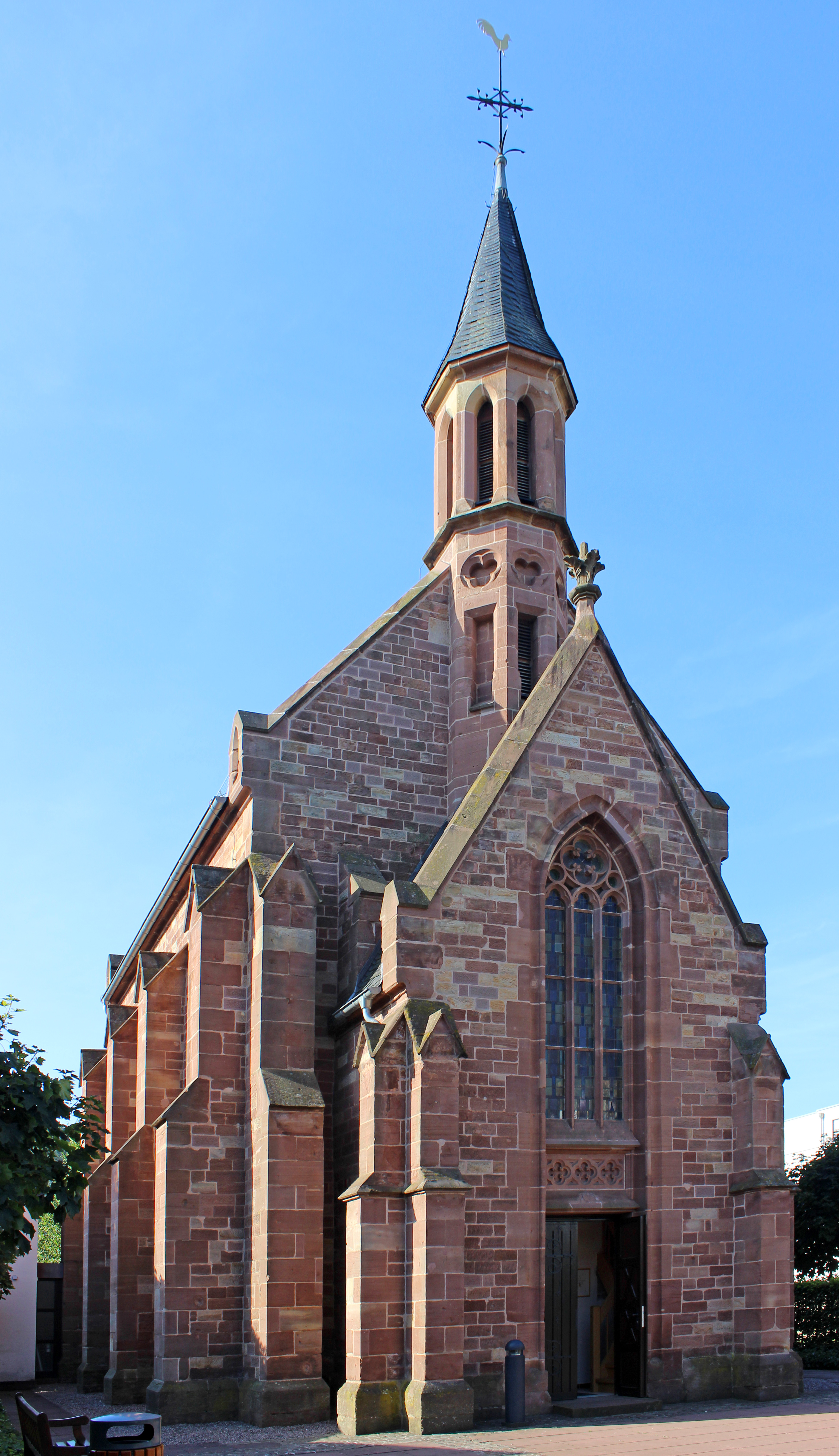 Die evangelische Kirche in Merzig, Landkreis Merzig-Wadern, Saarland. Die Kirche wurde in den Jahren 1863–65 nach Plänen von Carl Friedrich Müller (* 14. Juni 1833 in Hersfeld; † 1. August 1889 ebd.) errichtet.